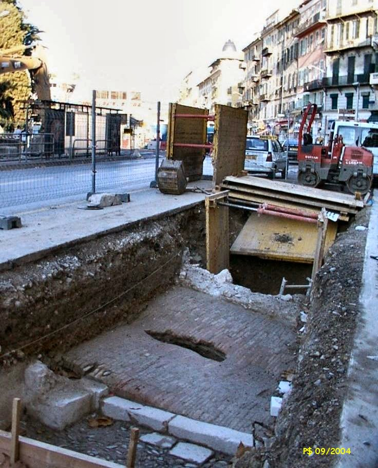 Le Pont vieux avec sa chaussée pavée de briques (moulées à la main) à la hauteur du 22,boulevard Jean Jaurès à Nice, découvert lors de fouilles archéologiques. La présence de briques usées montre l'intense fréquentation de cet axe dans les siècles antérieurs.